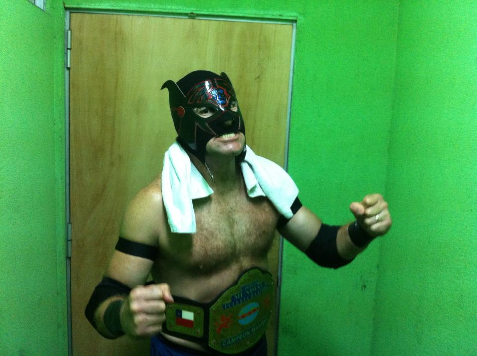 foto del luchador mexicano Arkangel De La Muerte